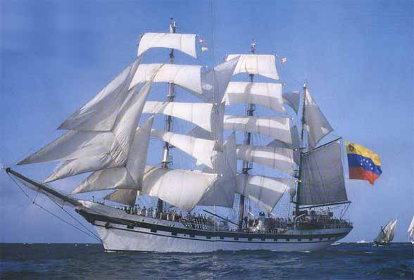 Fotografía del ARBV Simón Bolívar